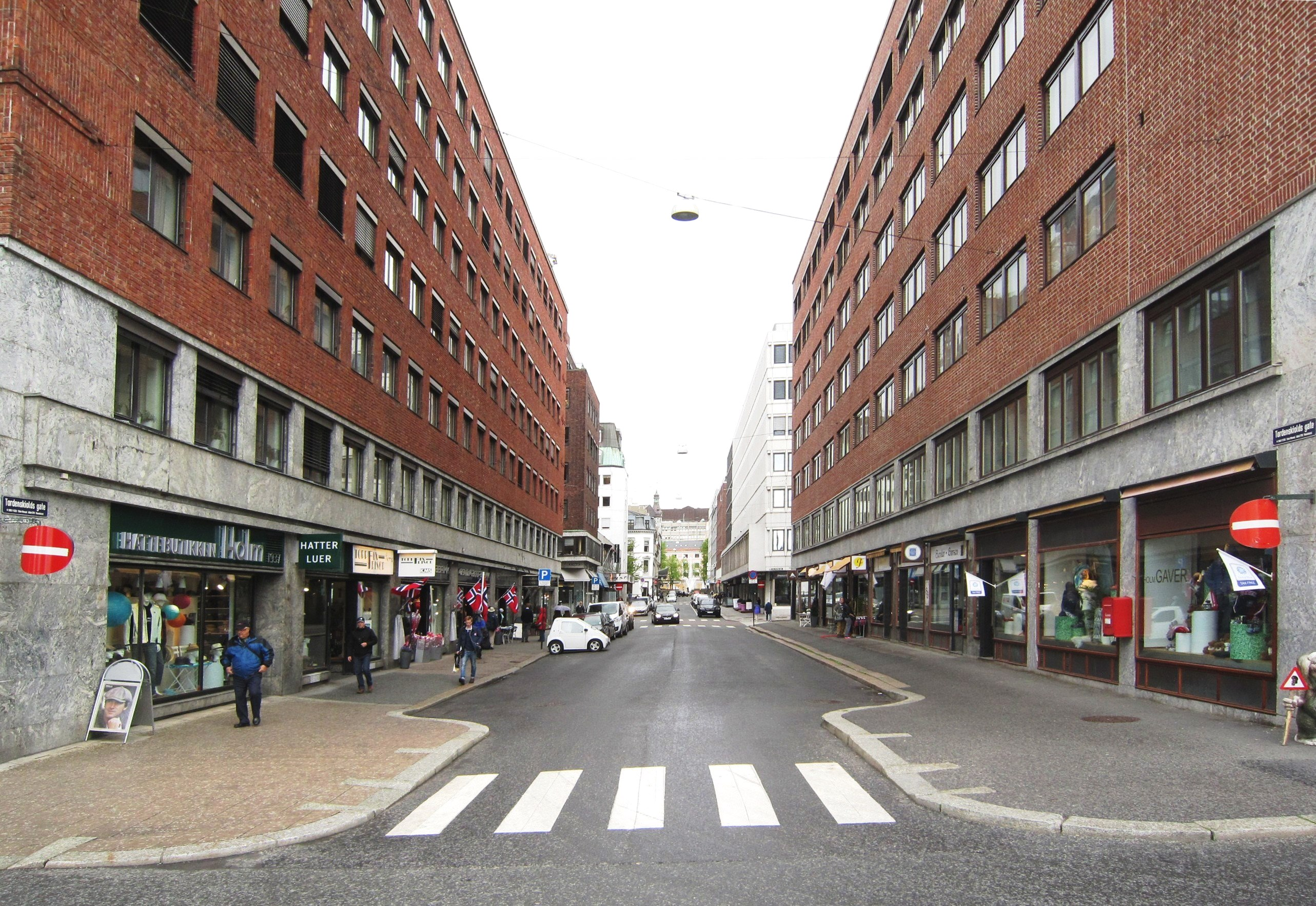 Tordenskiolds gate i Oslo. Tordenskiolds gate sett oppover i retning Stortingsgata. På hver side nærmest kamera er det kontorbygninger med forretninger i første etasje. Bygningen til venstre har adresse Hieronymus Heyerdahls gate 1 og er fra 1935-36, ark. Torp og Torp. Tordenskioldsgate 12 er bygningen til høyre, også kalt Oslo Trygdekasses bygning el. Oslo Trygdekontors bygning. Fra 1937, ark. F.S. Platou.